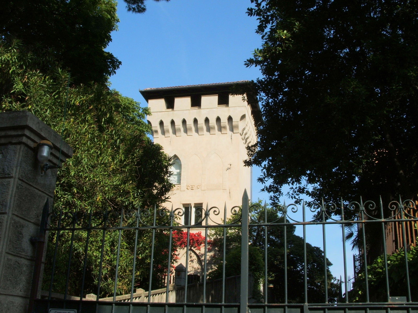 Genova, immagine dal quartiere di Albaro